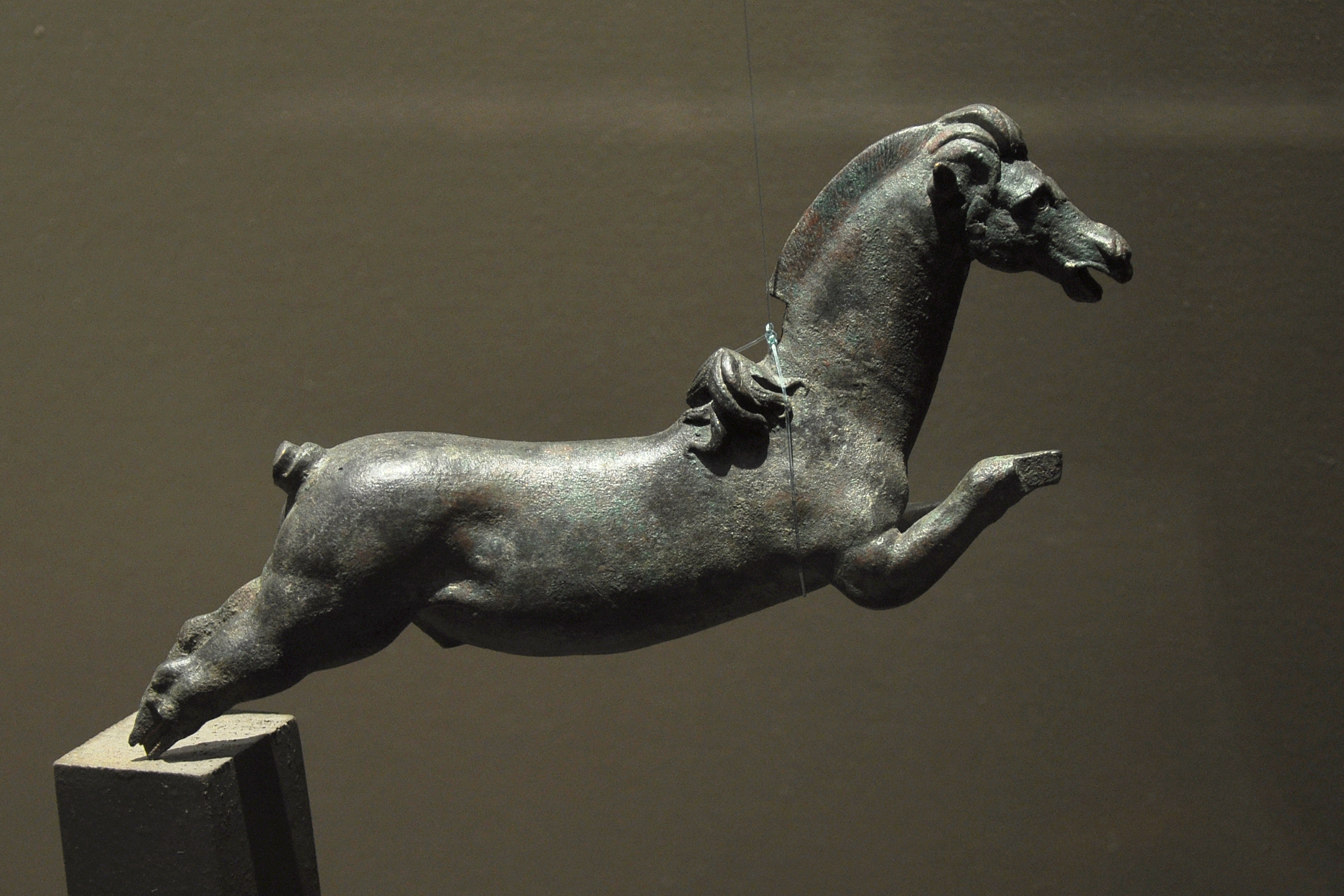 Cheval, époque gallo-romaine. Musée d'Evreux.